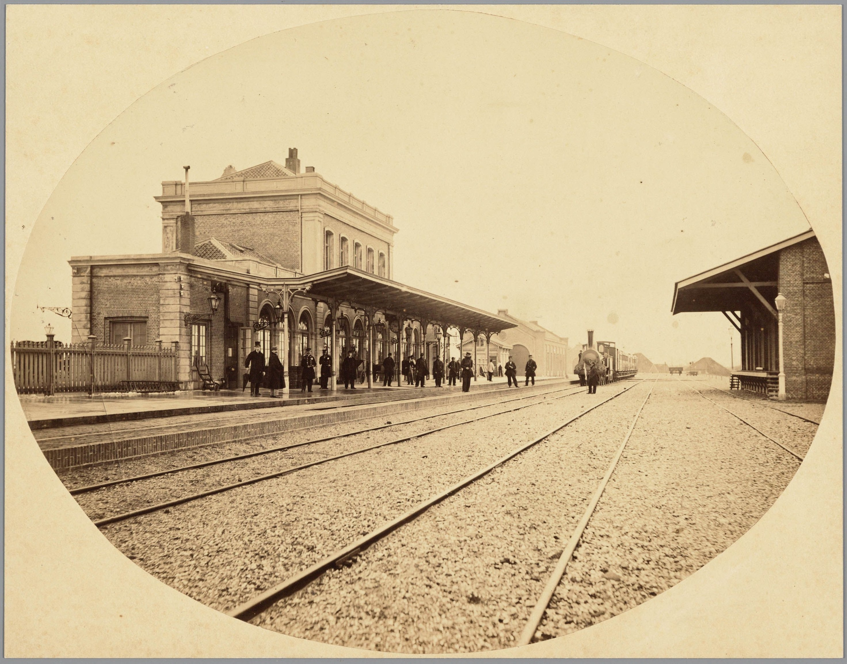 Vervaardiger onbekend. Jaar: 1866 Catalogusnummer: FO 1005899 Het net (1864/65) gebouwde station in Alkmaar aan de perronzijde gezien. Op het perron enkele reizigers en spoorwegpersoneel. Op het spoor staat de een trein te wachten met daarvoor een baanwachter met zijn vlag. Op de achtergrond rechts boerderijen aan de Wognumsebuurt.